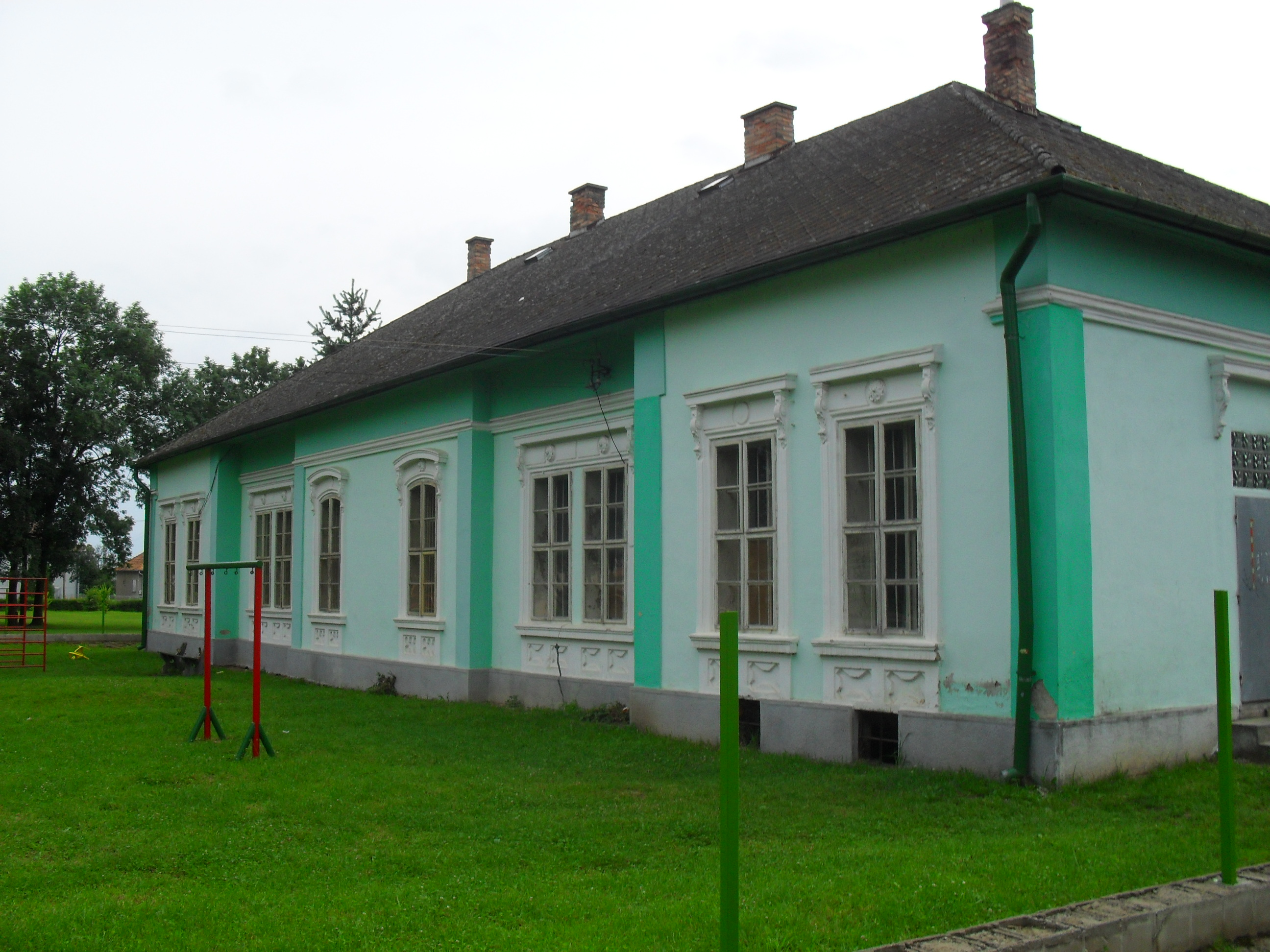 Tornalja/Sajószárnya - kastély (ma óvoda)